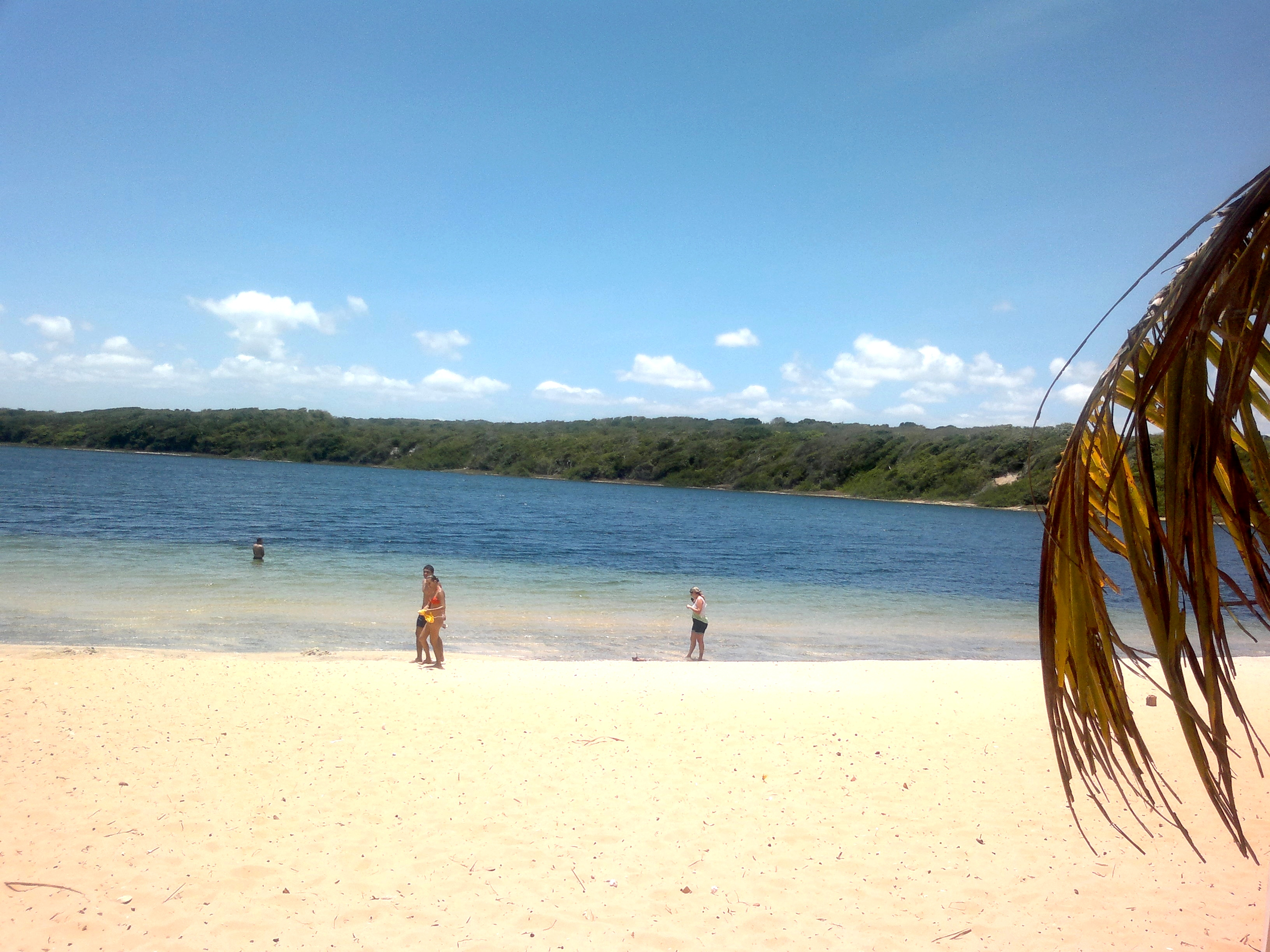 Lagoa de Arituba - Nisia Floresta-RN